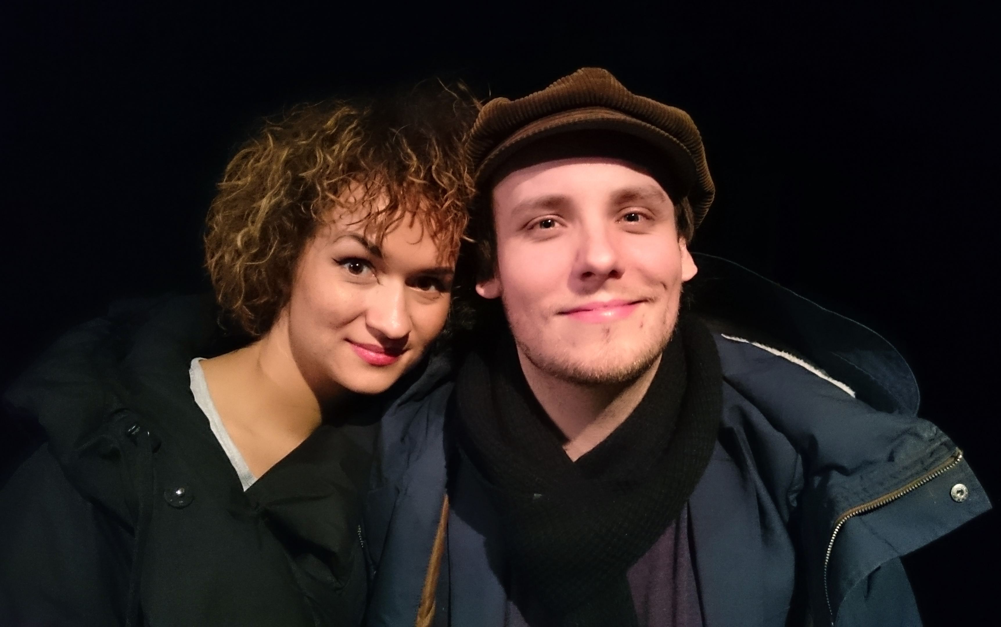 Bianca Kronlöf och Ronnie Sandahl efter en visning av filmen "Svenskjävlar" på Folkteatern i Göteborg.